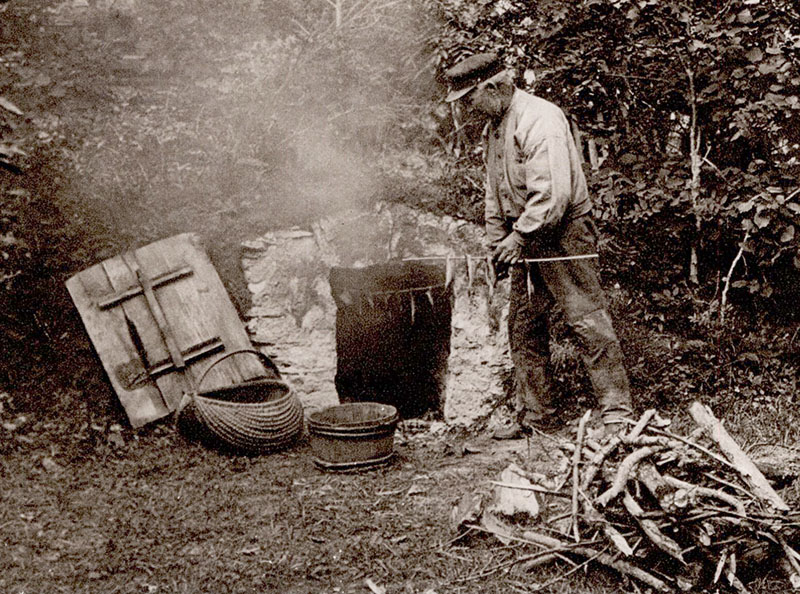 Böcklingen rökes. Bunge, Gotland